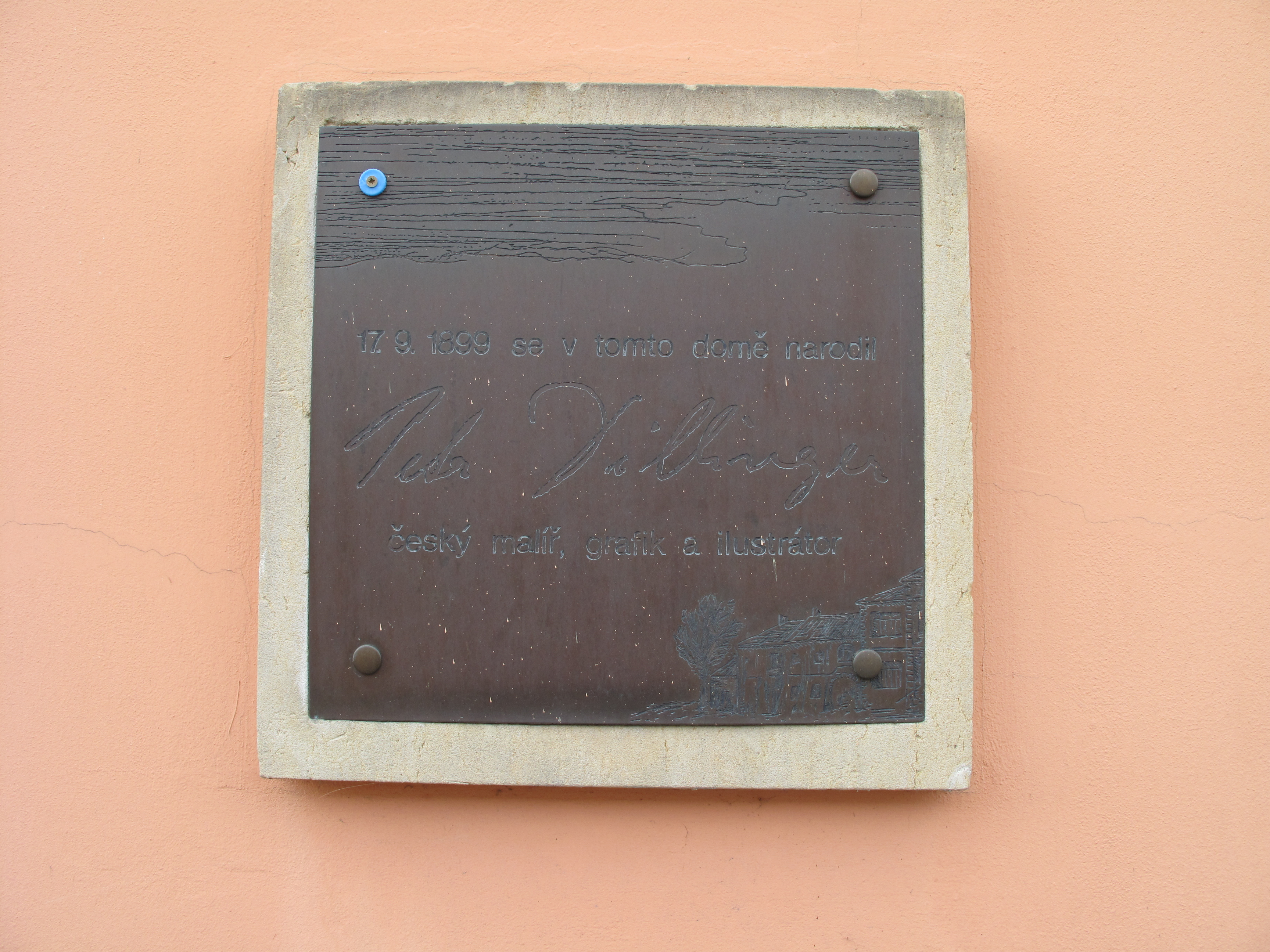 Český Dub IV. Okres Liberec, Česká republika. Starý zámek čp. 11, pamětní deska.